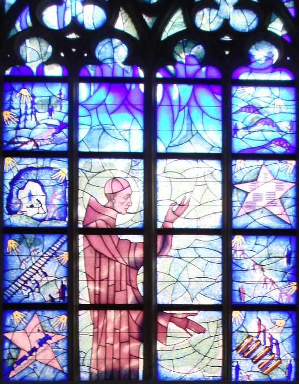 Wrocław, kościół par., ob. garnizonowy p.w. św. Elżbiety, 1 ćw. XIV, 1486